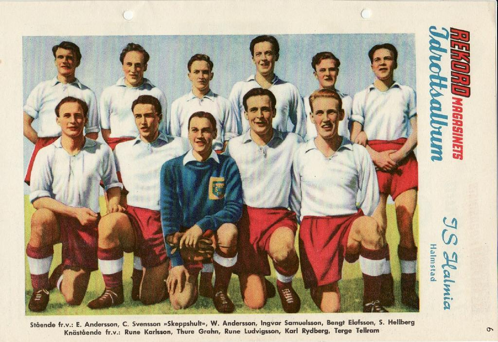 Allsvenska IS Halmia den 27 maj 1950. Lagbild i Rekordmagasinet nr. 23 1950.